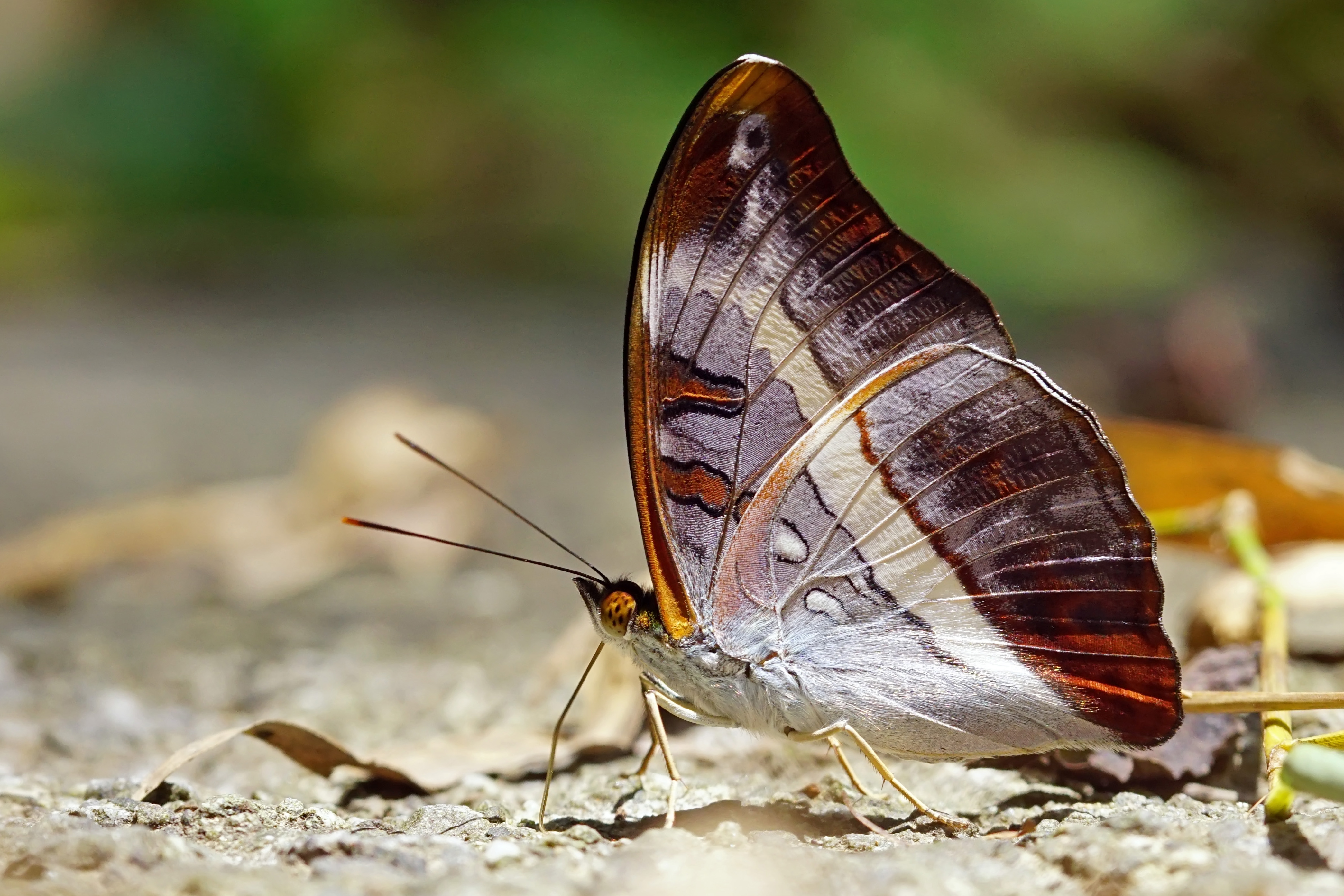 紫俳蛺蝶 Parasarpa dudu jinamitra